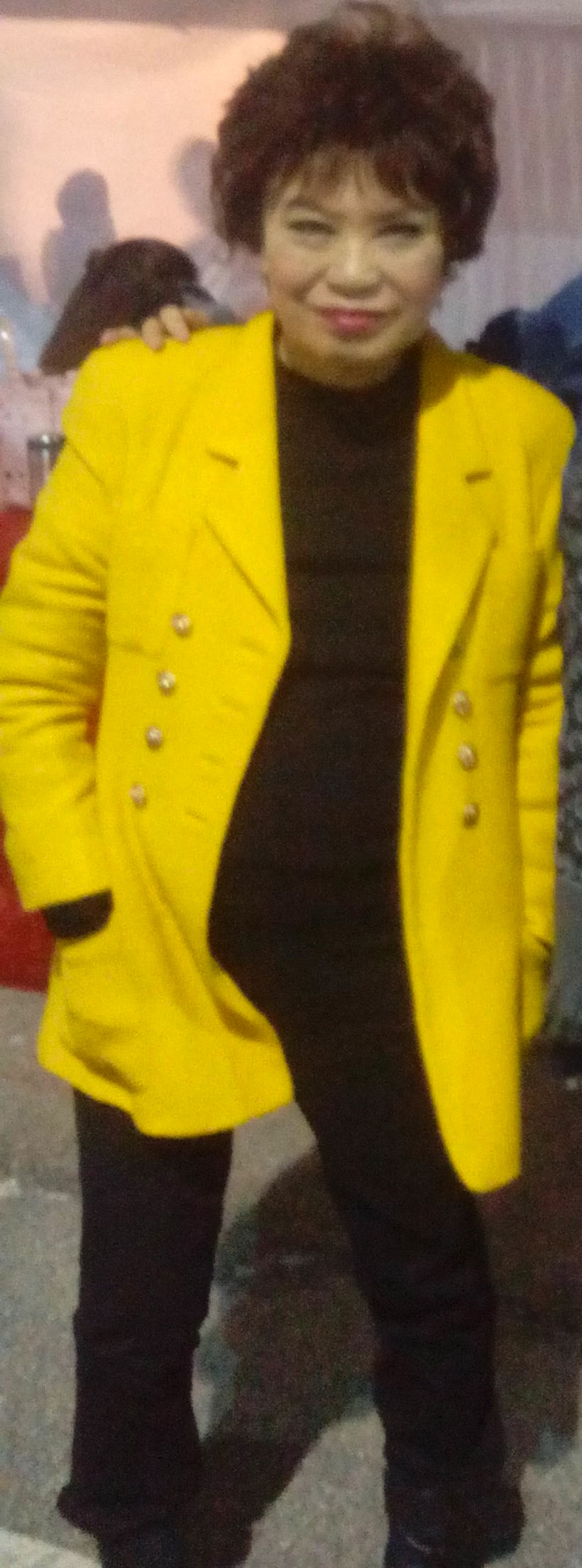 中文（香港）: 余慕蓮的樣子